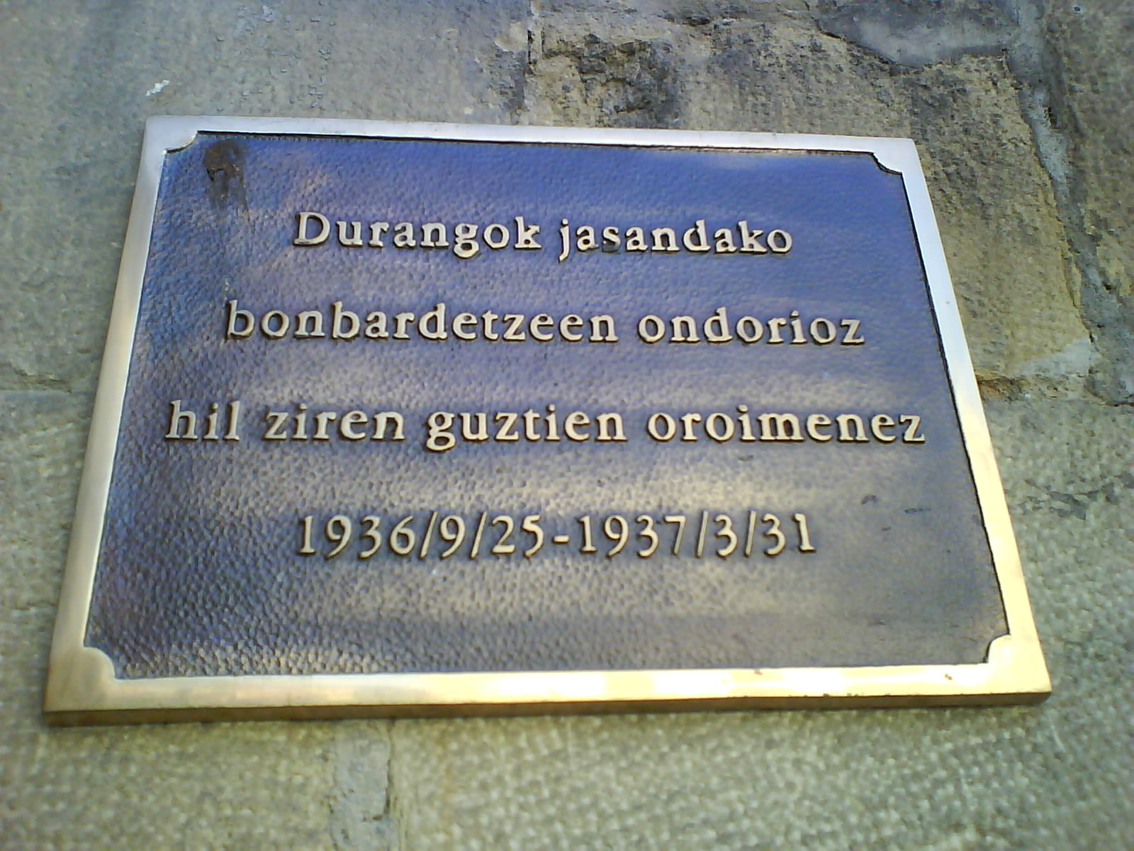 Placa conmemorativa de los muertos en el bombardeo de Durango, Vizcaya País Vasco (España).